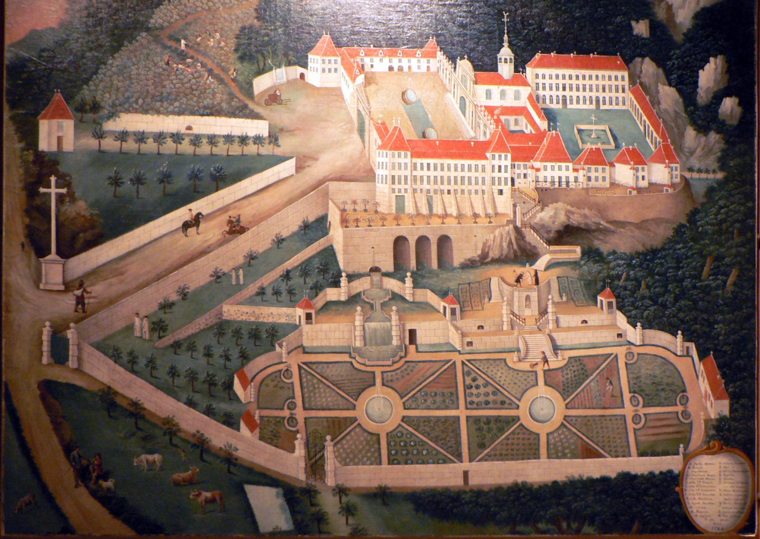 détail de la carte (vue cavalière) de la chartreuse de Sélignac, Val Saint Martin, Ain, province chartusienne de Bourgogne. Huile sur toile 223,5 X 252,4 cm, réalisé par le peintre Raquelli en 1784. Restauration de la toile par Géraldine Albers (Paris) en 19999. conservée dans la "galérie des cartes", qui compte une collection de 77 toiles de chartreuses. Musée de la Grande Chartreuse. Saint-Pierre-de-Chartreuse, Isère, AuRA, France. Pour plus d'information sur la carte: Pierrette Paravy (dir.), Les cartes de Chartreuse, Glénat éd., Grenoble, 2010, ISBN 9782723480567, pp. 68-71.